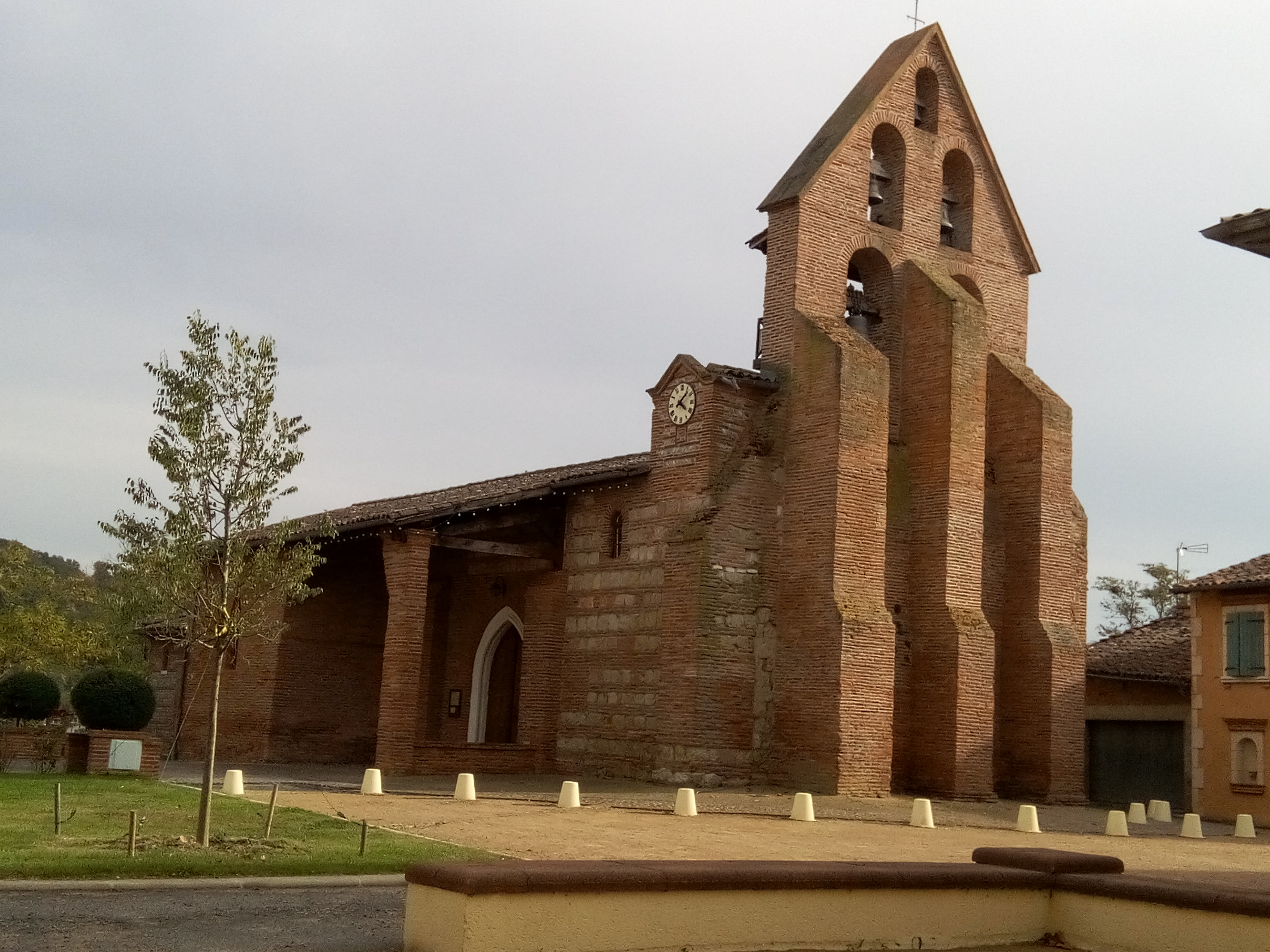 Église du Fauga